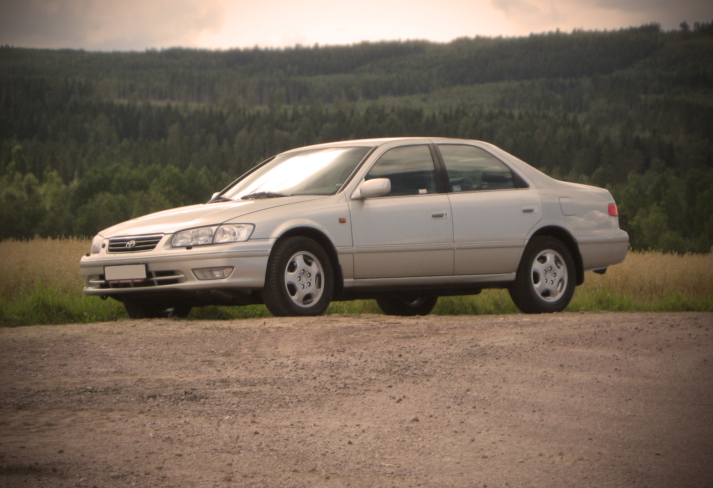 En Toyota Camry från 2000